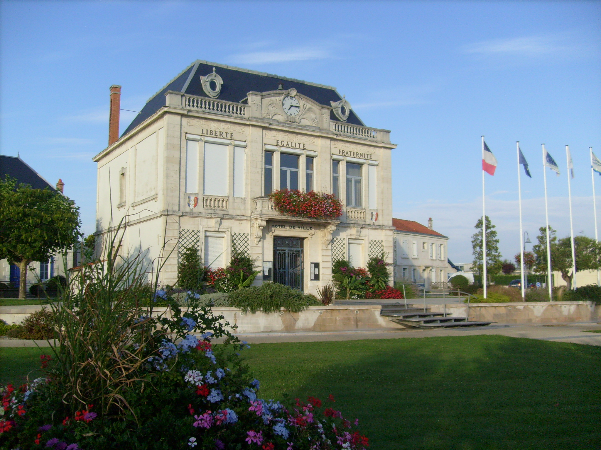 Hôtel de ville de Bourcefranc-le-Chapus